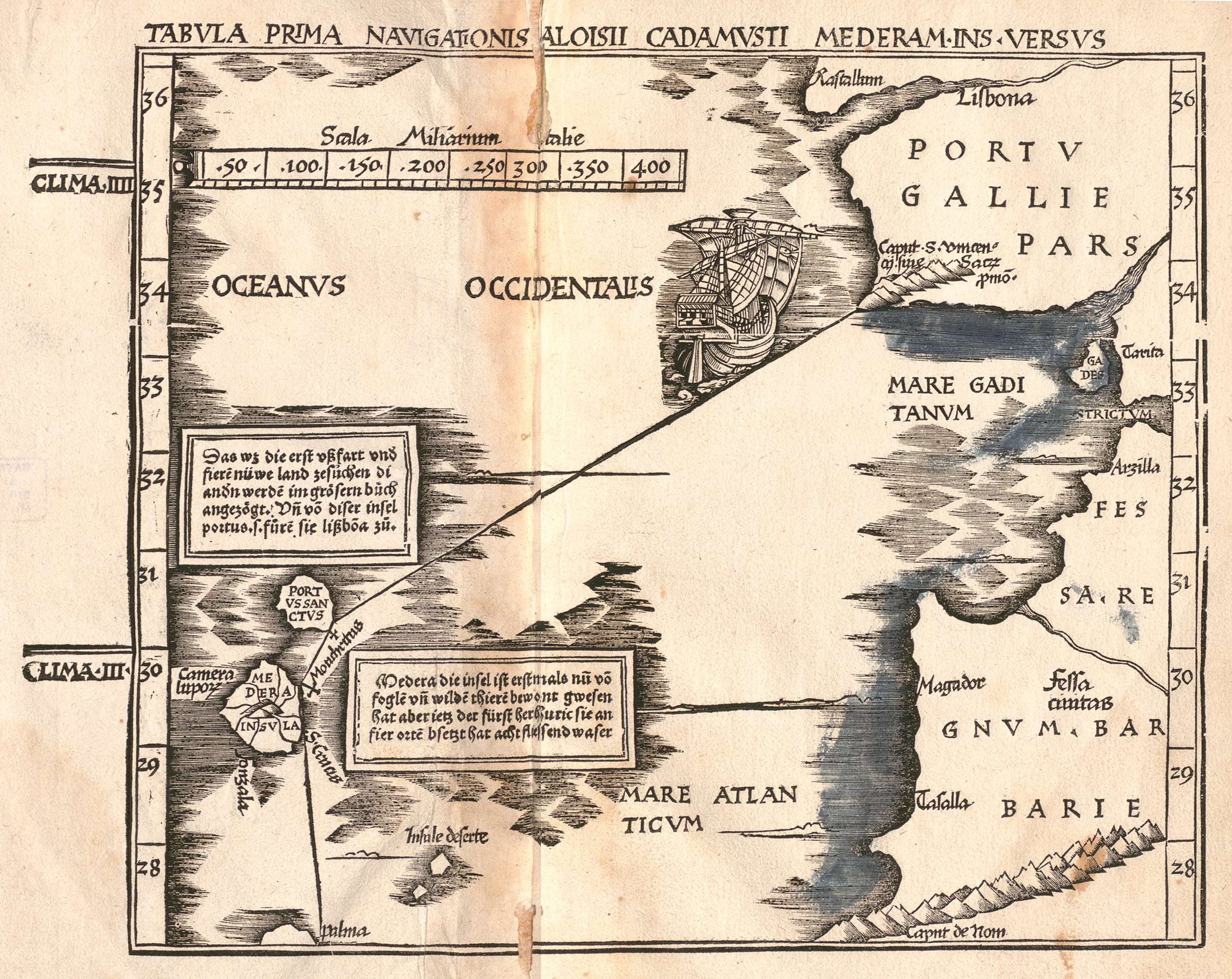 Im Auftrag von Hans Grüninger angefertigte „Mercarthe“ des Ostatlantiks mit der Insel Madeira. In verkleinerter Form gedruckt nach der Vorlage von Martin Waldseemüller.